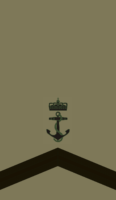 OR5 NOR - Kvartermester